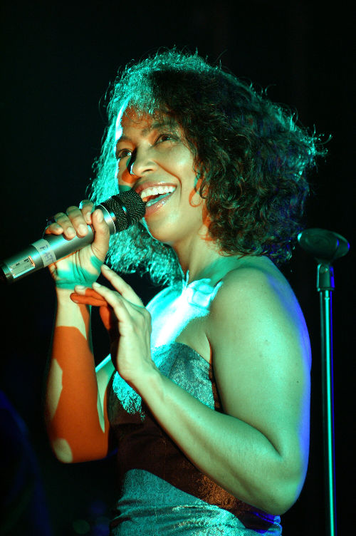 Sängerin Pat Appleton